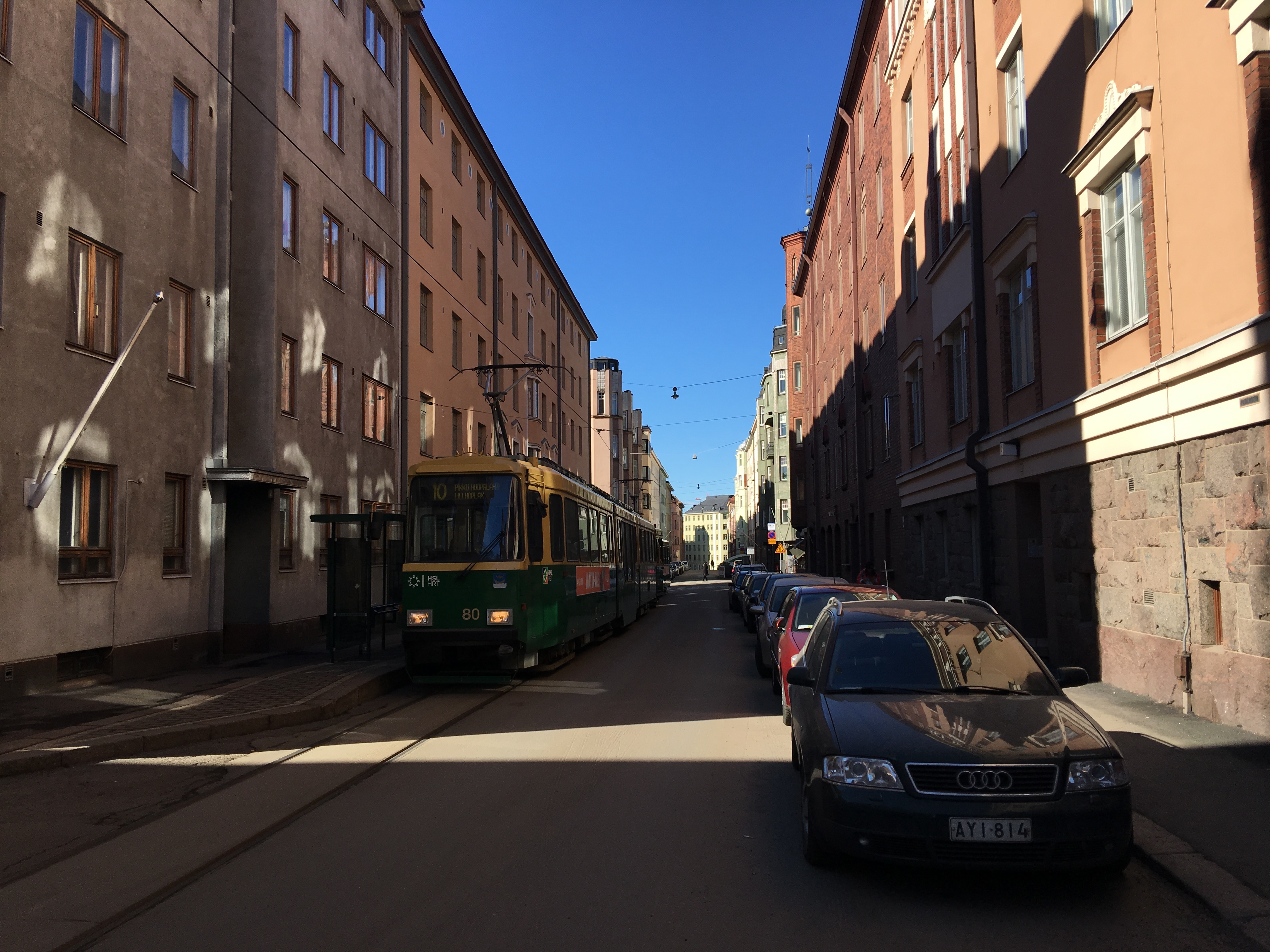 Tarkk'ampujankatu Helsingin Ullanlinnassa.